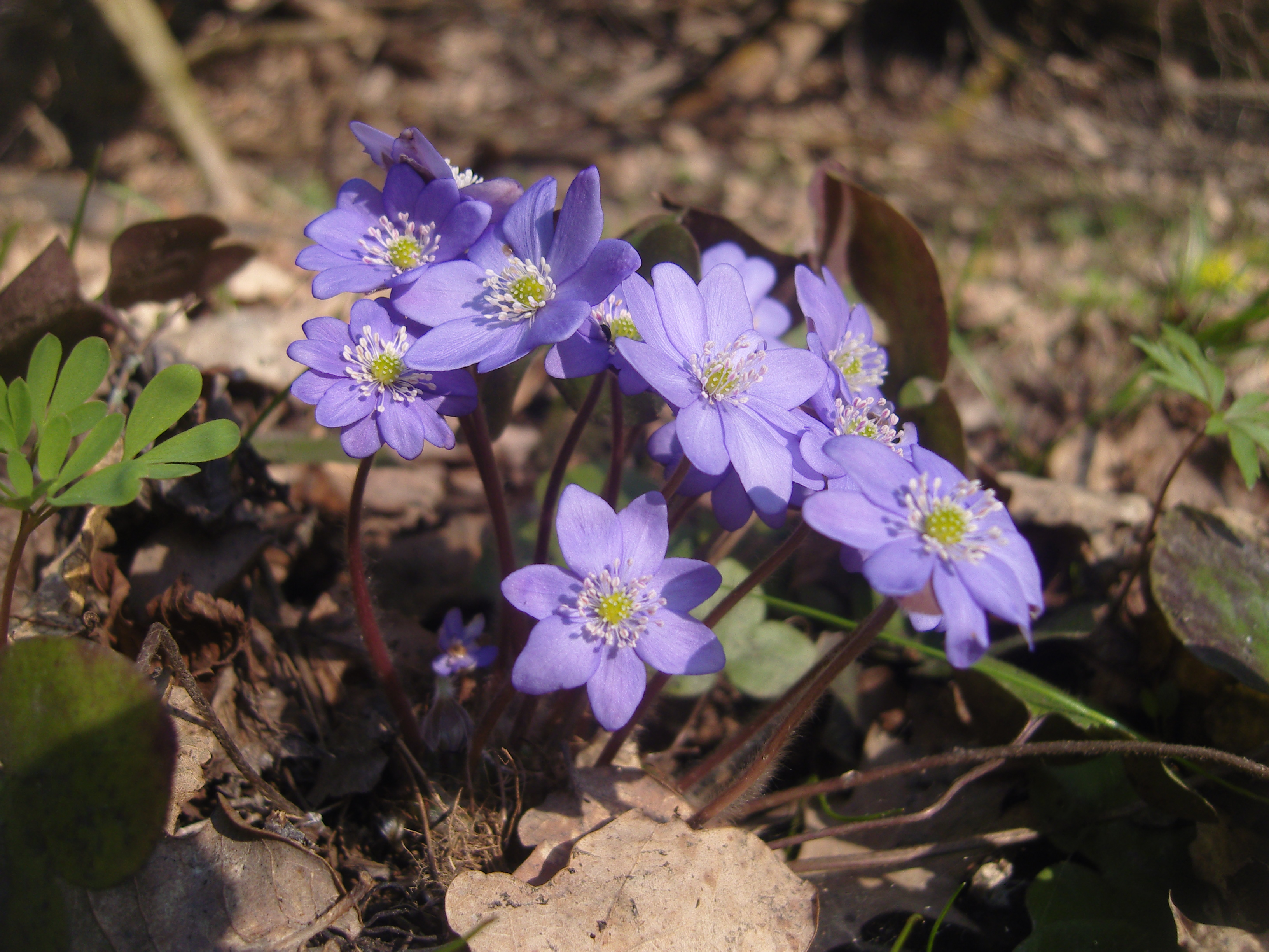 Печеночница благородная. Лес на Ворскле, Белгородская область.